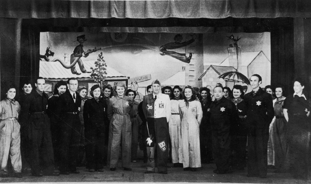 Westerbork, Holland, The play's cast in the camp, Appel, 1943